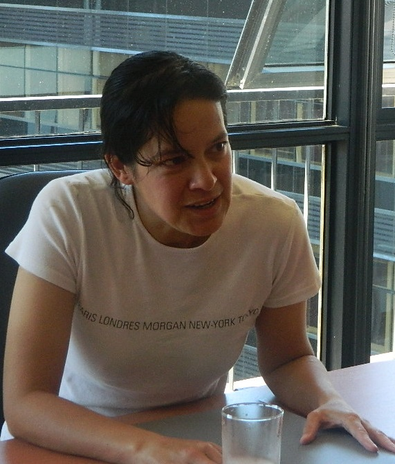 Florencia Romano fue la primera árbitra mujer de fútbol en Argentina.